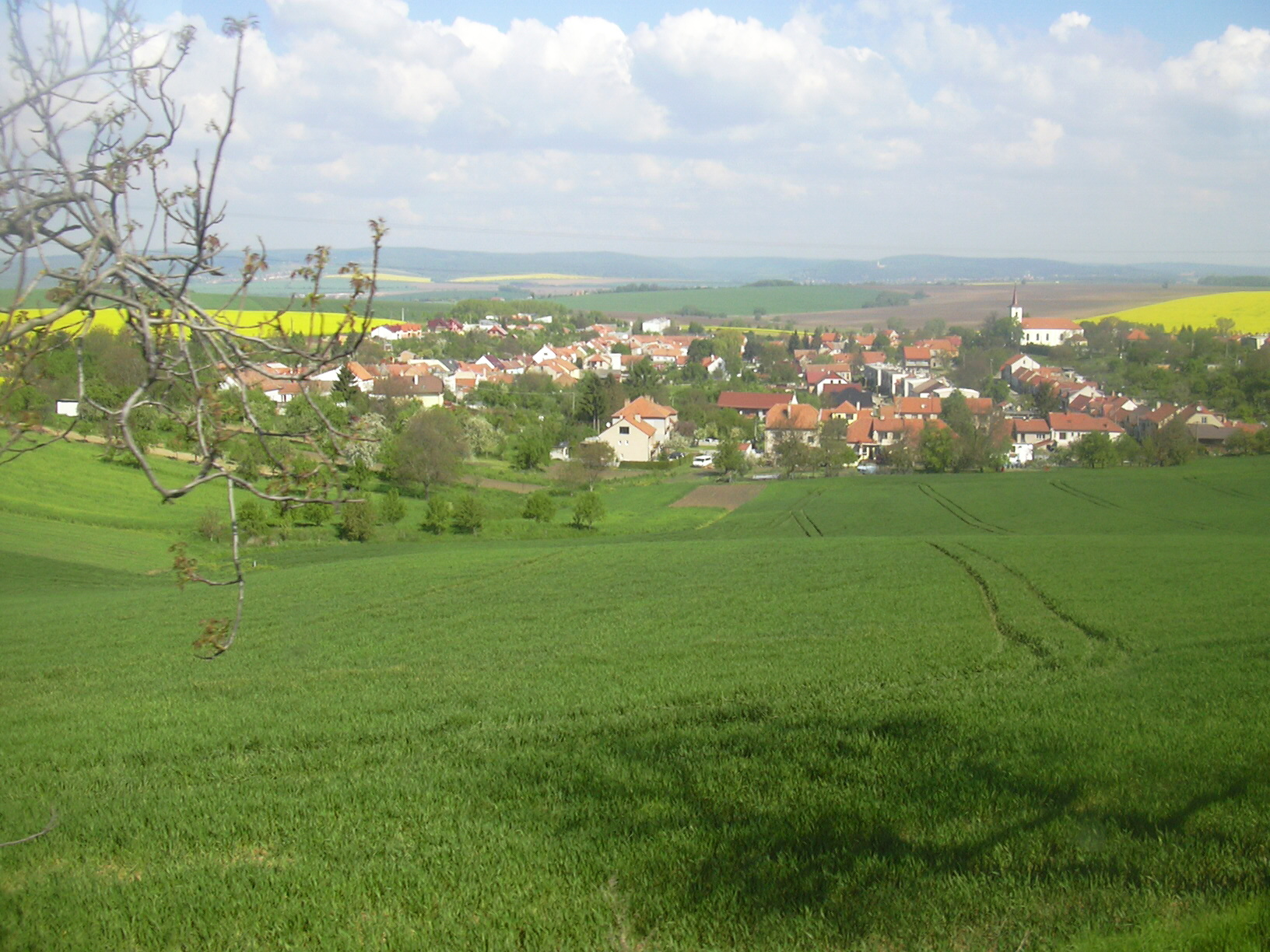 Pohled na Dražovice (Vyškov- Czech republic)